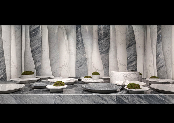 STONE FOREST1